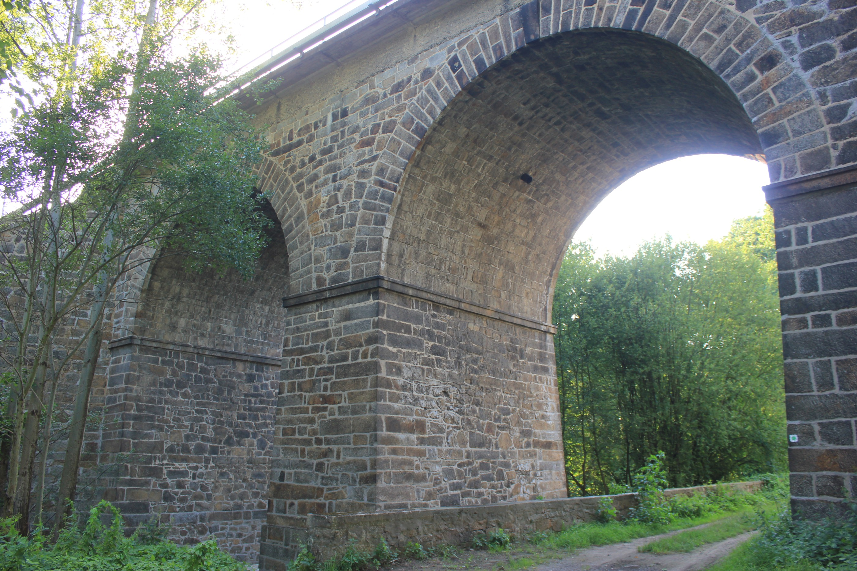 Hornjoserbsce: Železniski móst přez Dołhu wodu blisko Žičenka